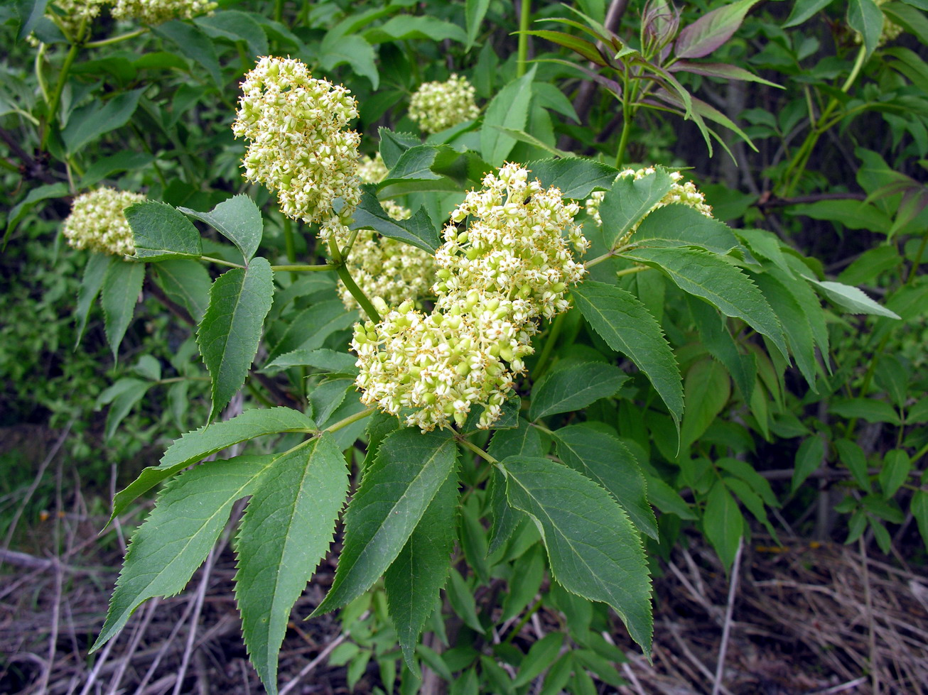 Raudonuogis šeivamedis (Sambucus racemosa) Šeima. Ūksmininiai (Adoxaceae) Foto: Algirdas, 2006 m. gegužės 20 d., Lietuva